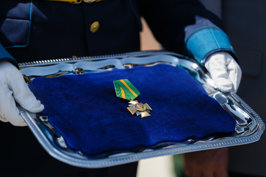 Вручение ордена Суворова 7-й гвардейской десантно-штурмовой (горной) дивизии